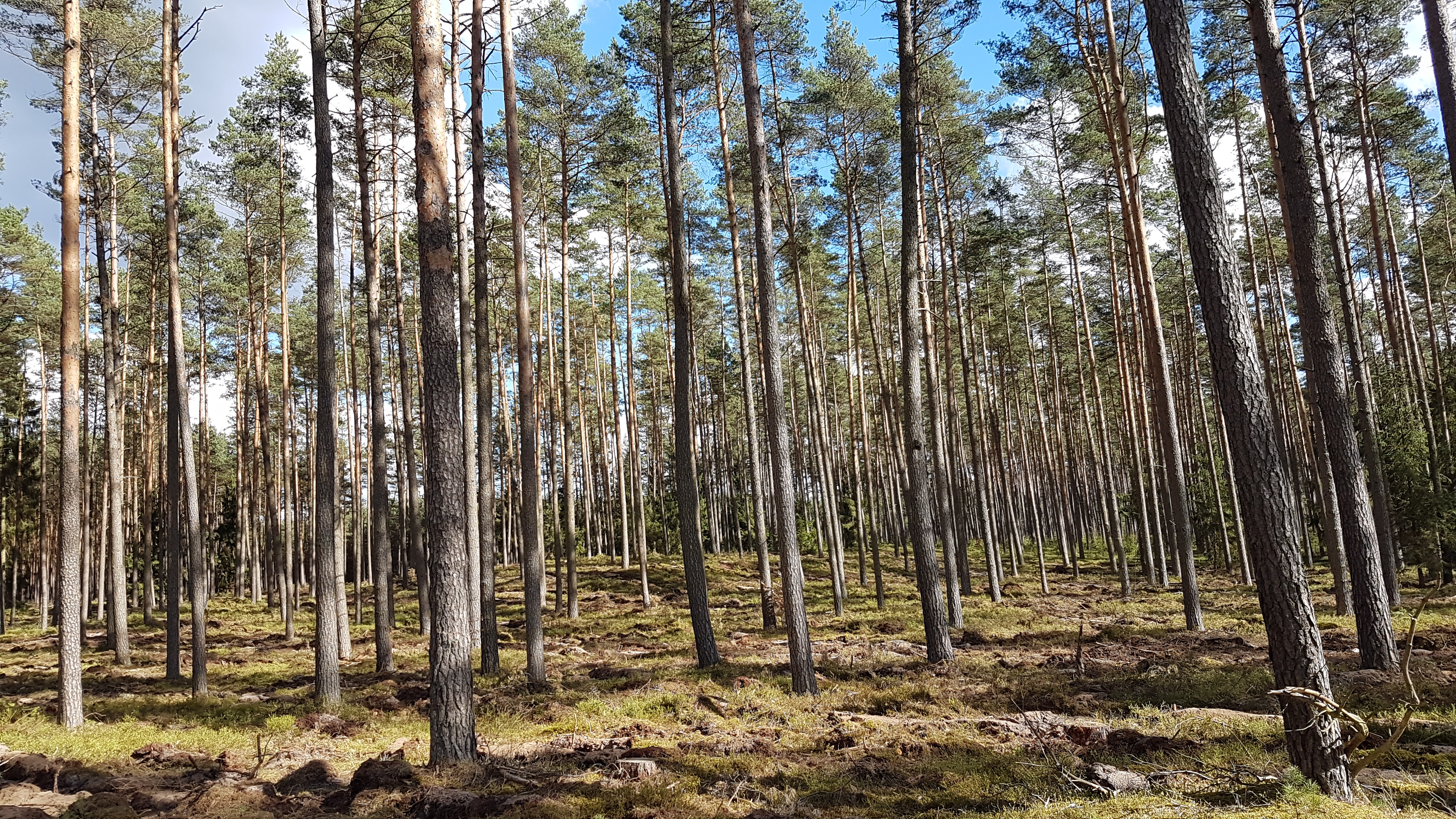 Waldgebiet nahe Küstrinerbach zwischen Küstrinsee und Oberpfuhl See.